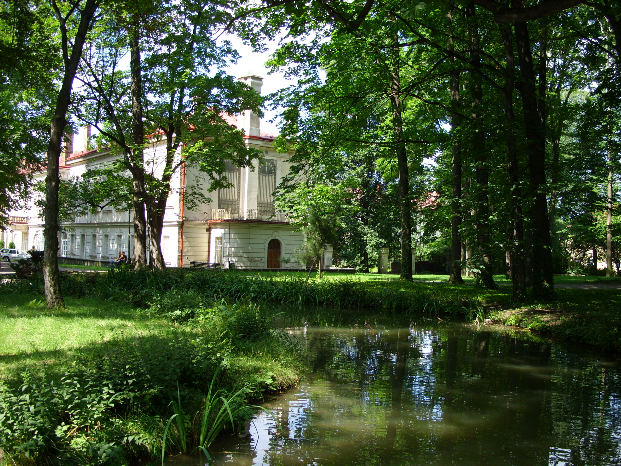 Park w Żywcu